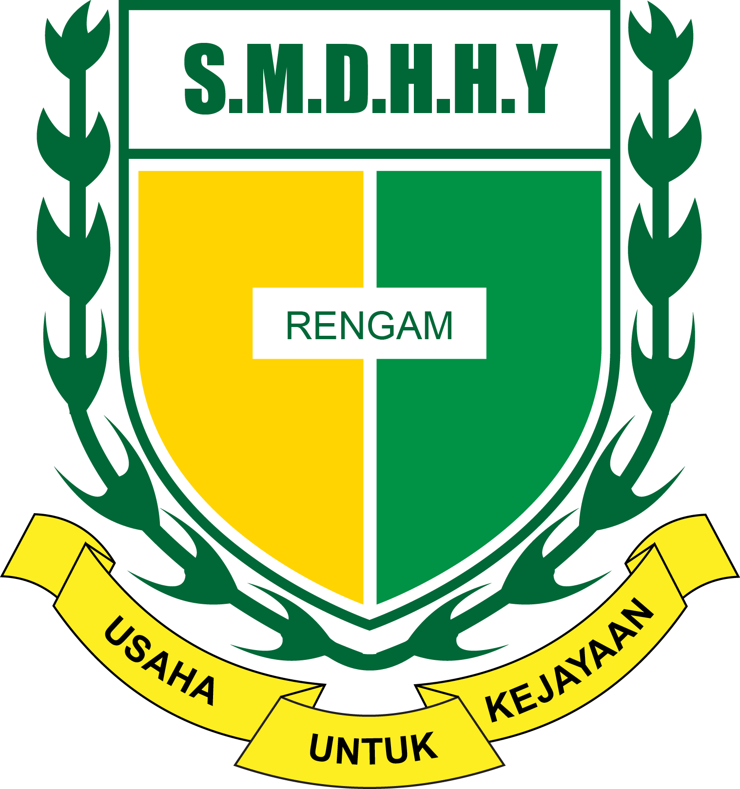 Logo Lama SMKDHHY